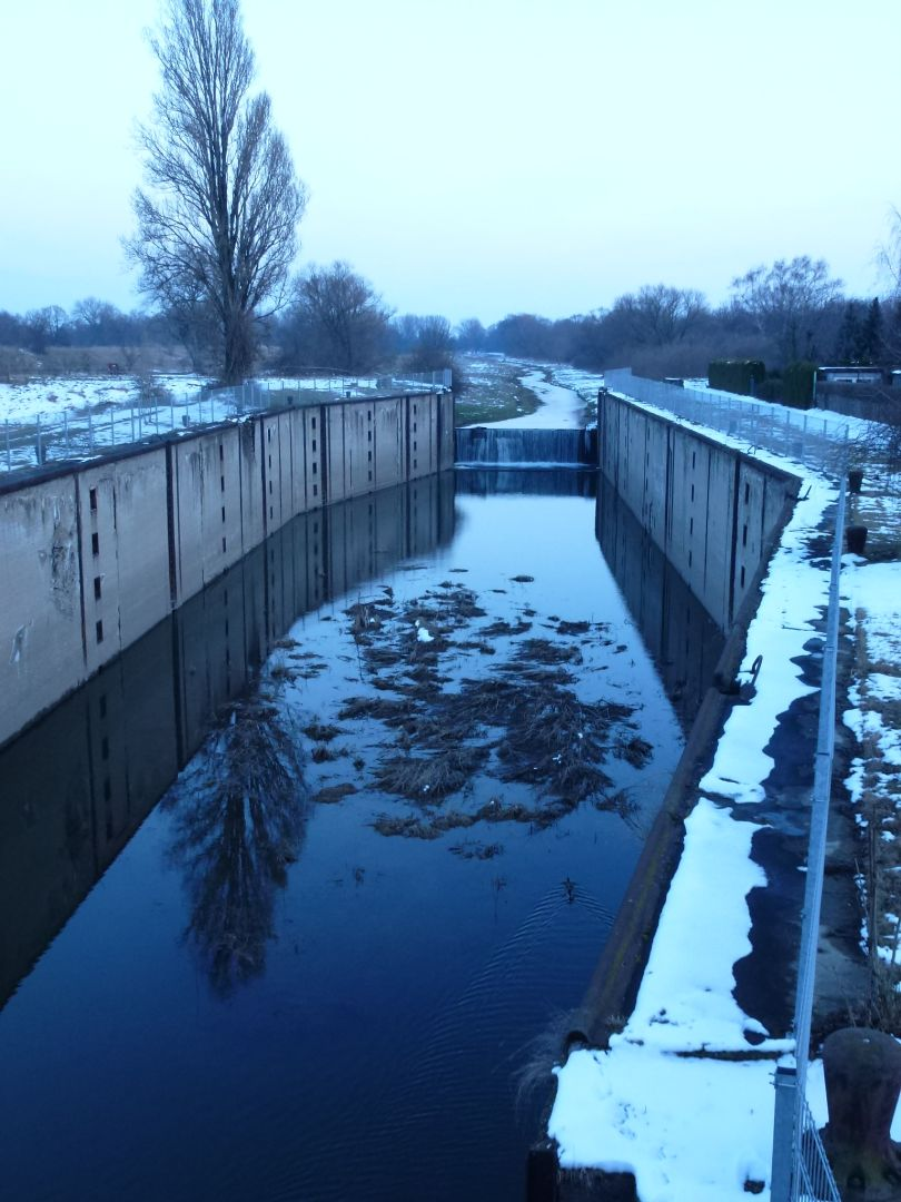 Schleuse des Mittelkanals bei Merseburg, Schleuse Werder, OT Werder